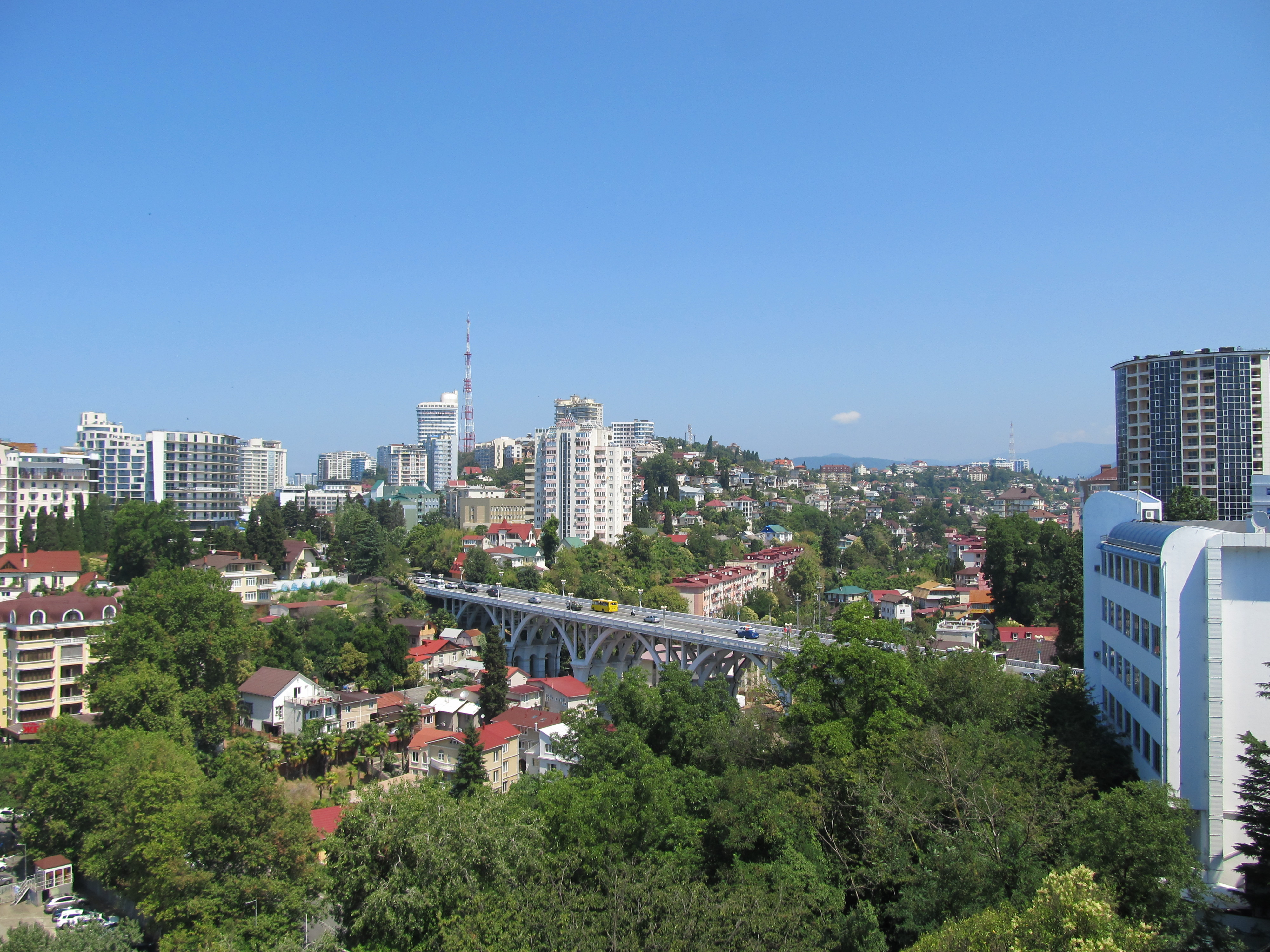 Верещагинский виадук (Светланинский виадук), вид на Центральный микрорайон и микрорайон Светлана (Хостинского района) города Сочи